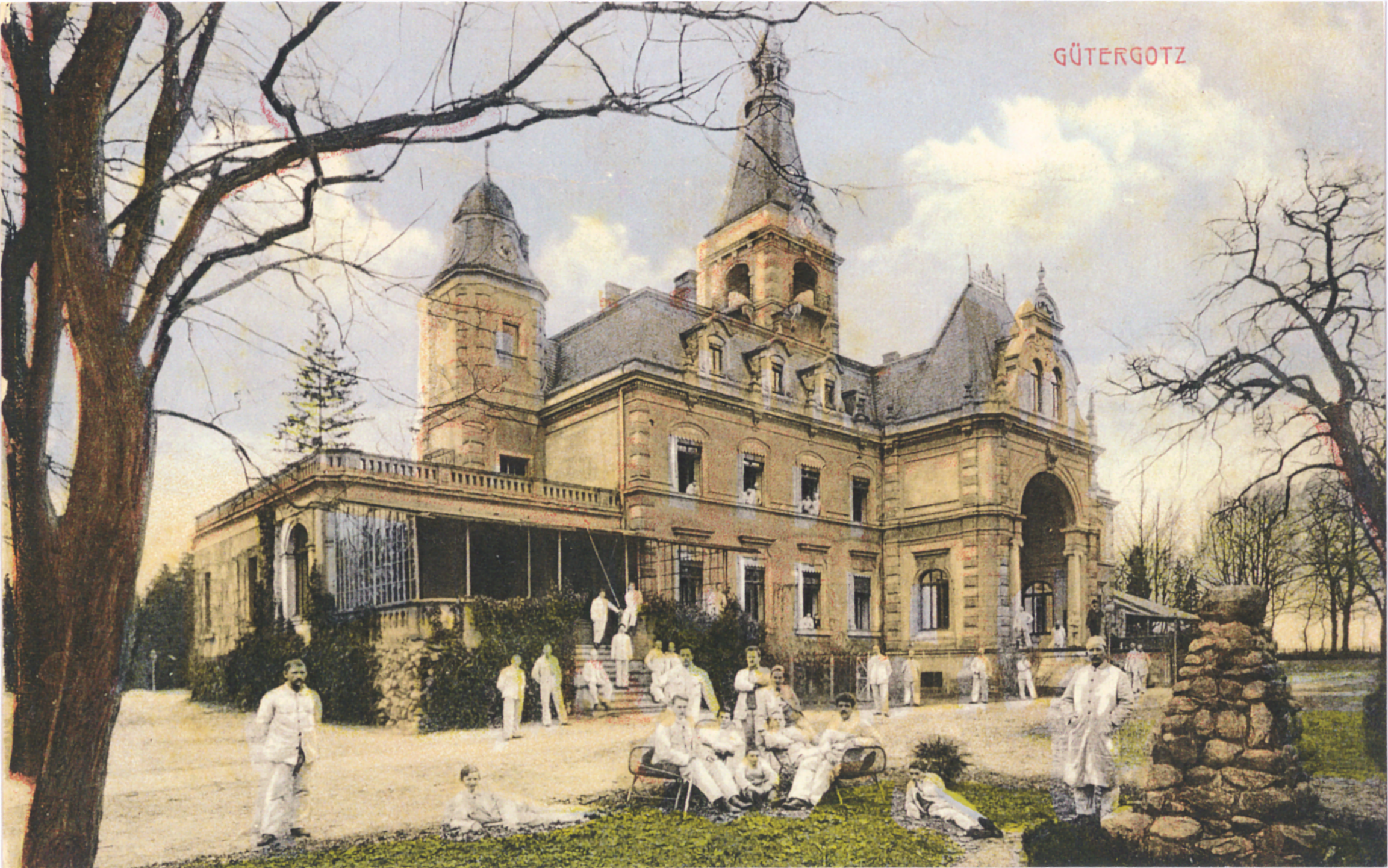 Schloss Güterfelde während der Nutzung als Sanatorium auf einer 1914 gestempelten Ansichtskarte.